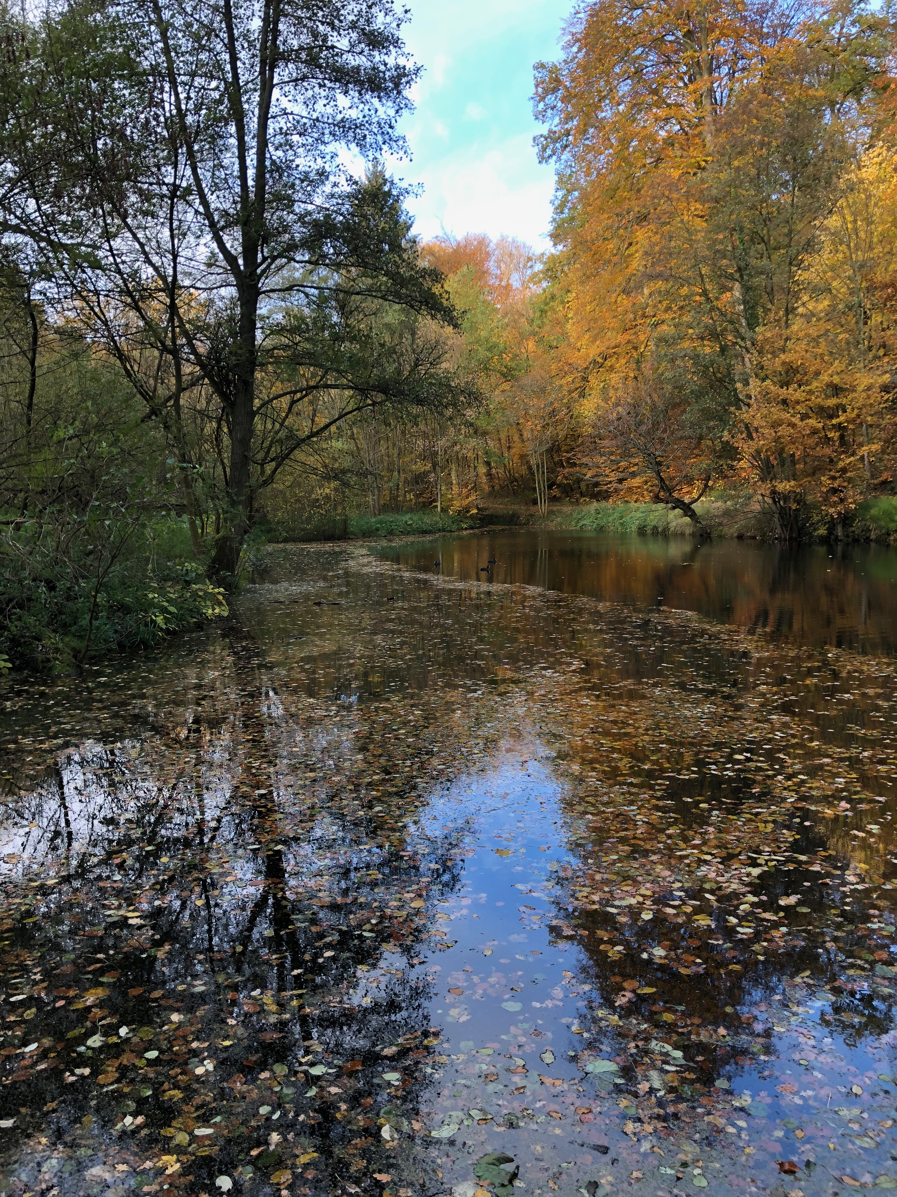 Étang du Clos des Chênes (Réserve naturelle des Enfants Noyés)